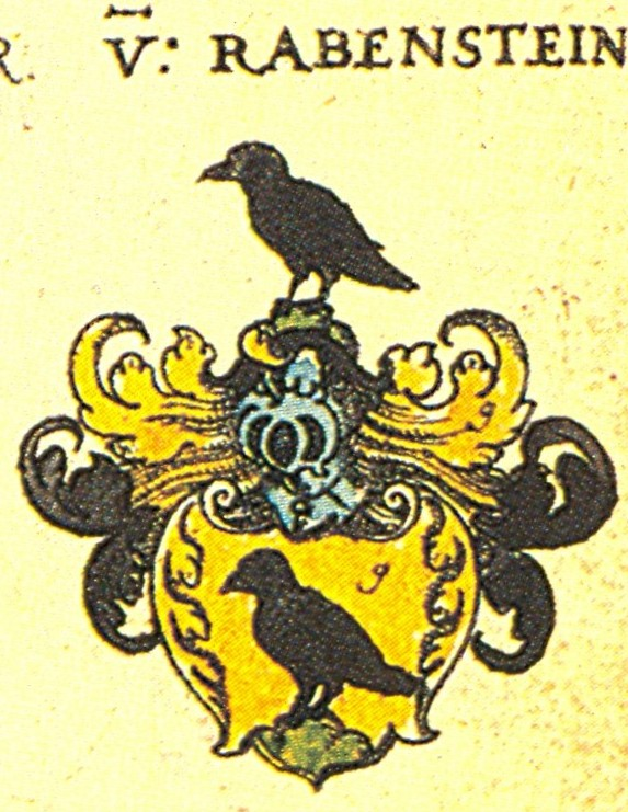 Ritterschaft und Adel in Franken von Rabenstein